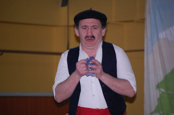 Armando Felgueroso, monologuista, nel papel de Min de les Pieces.